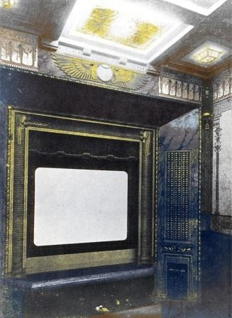 Colorisation d'un vieux cliché de l'intérieur du cinéma Le Louxor (Salle du 10e arrondissement de la ville de Paris).